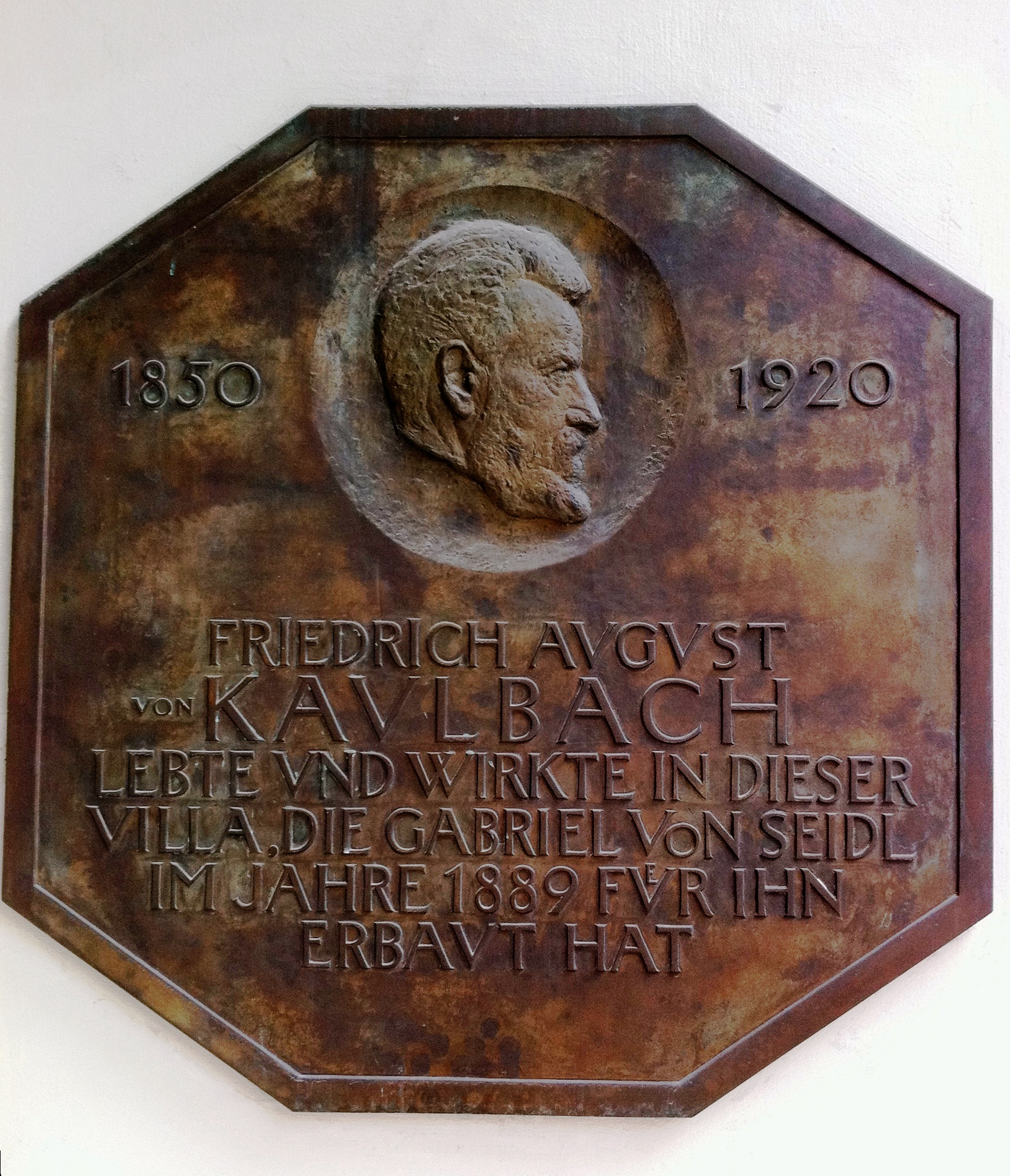 Gebäudetafel an der Kaulbach-Villa in der Kaulbach-Straße 15 in München-Maxvorstadt, Regierungsbezirk Oberbayern, Bayern.